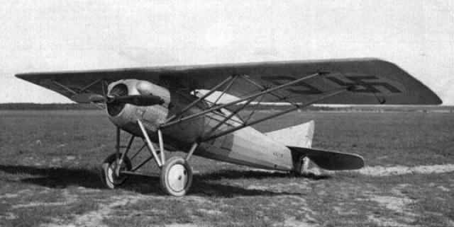 Gourdou-Leseurre ET1=GL.22 sous les couleurs finlandaises